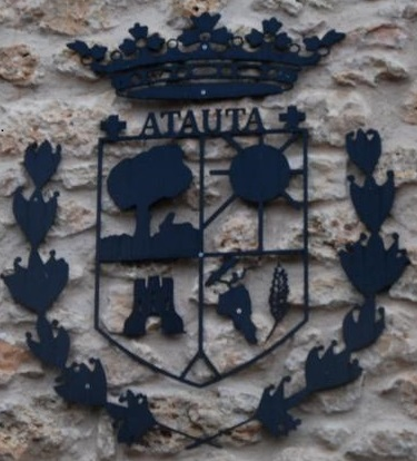 Escudo de la localidad soriana de Atauta (España)